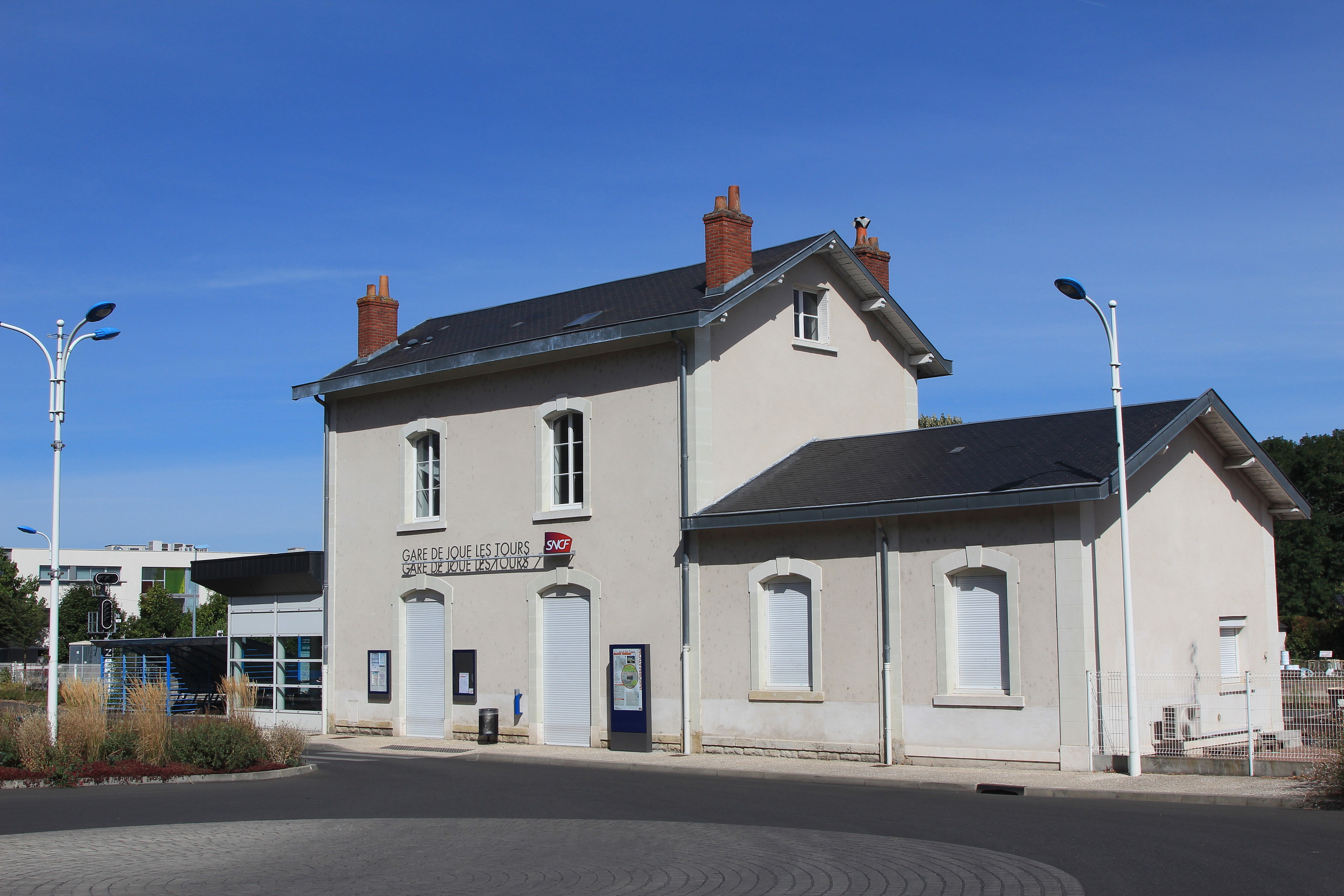 Le bâtiment voyageurs de la gare de Joué-lès-Tours vu côté parvis